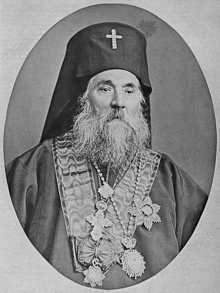 Български Антим I (*1813 - †1888) е виден български православен духовник, пръв екзарх на самостоятелната Българска екзархия. Deutsch Anthim I. (*1813 - †1888)war ein bulgarischer Aktivist der Bulgarischen Nationalen Wiedergeburt und erster Exarch des Bulgarischen Exarchats English Antim I (*1813 - †1888) was a Bulgarian education figure and the first head of the Bulgarian Exarchate